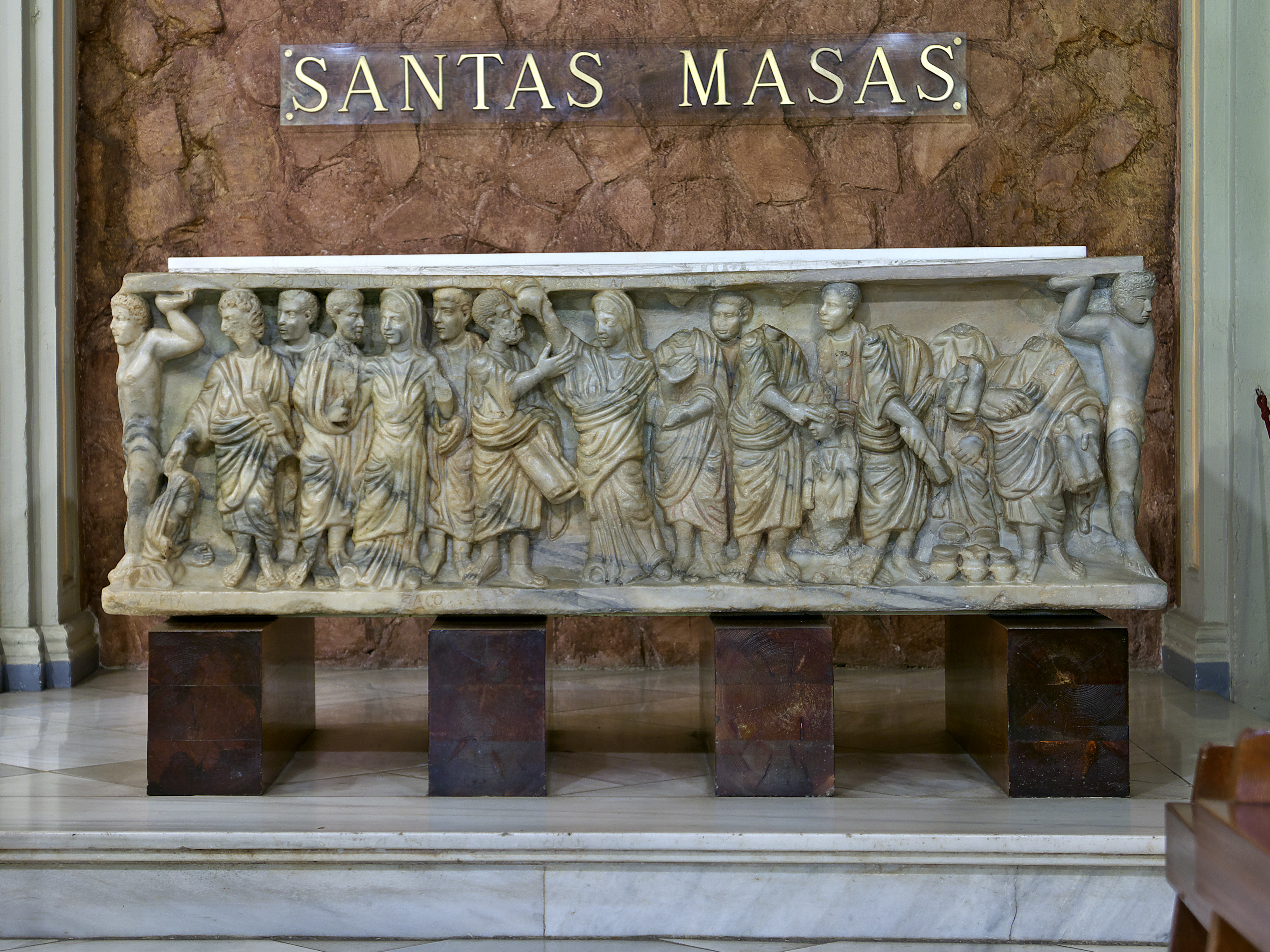 Basílica de Santa Engracia (Zaragoza). Frontal del sarcófago paleocristiano Receptio Animae (330 d.C.) conteniendo reliquias de las Santas Masas. Tallado en Roma con mármol proconeso y procedente de la necrópolis paleocristiana de Zaragoza, localizada en este mismo lugar de la cripta.